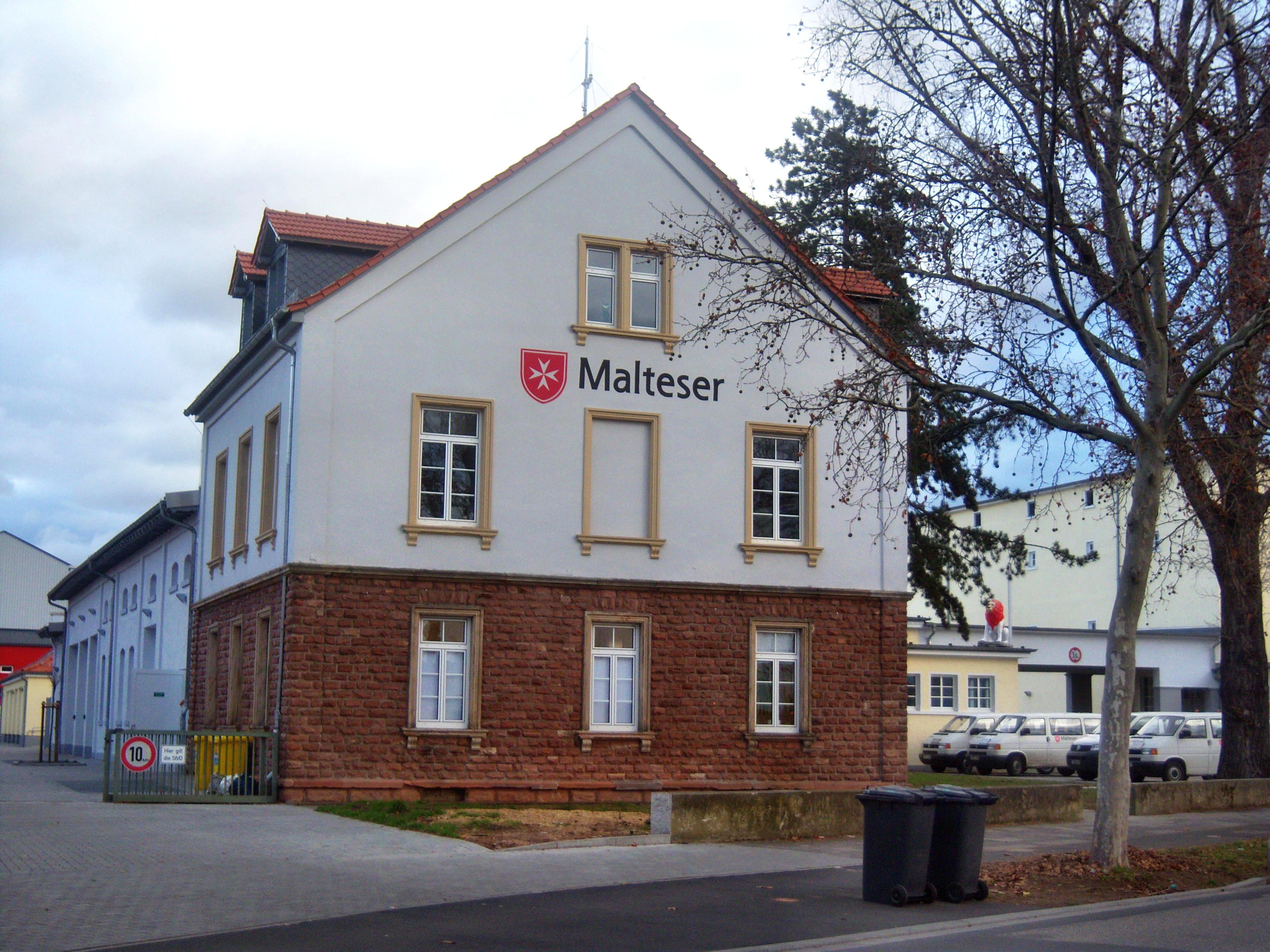 Malteser-Gebäude in Frankenthal (Pfalz), früher der Alte Schlachthof